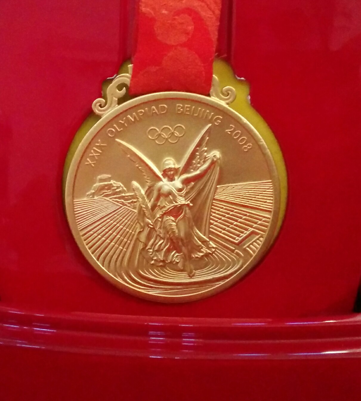 Medalla de oro de los Juegos Olímpicos Beijing 2008 obtenida por el ciclista Juan Curuchet